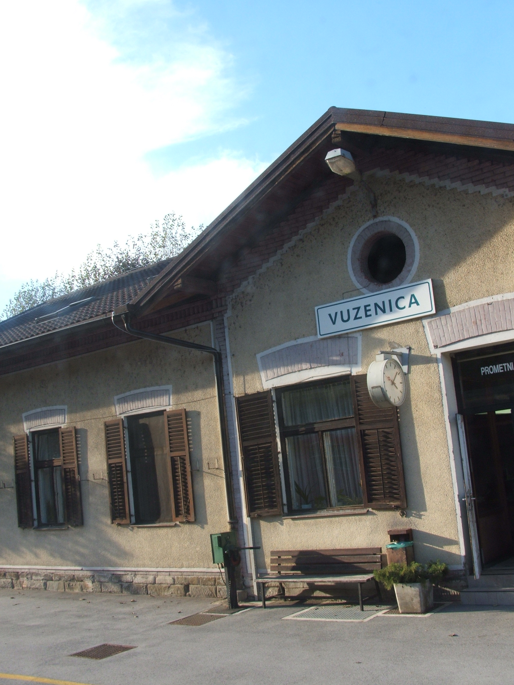 Ravne